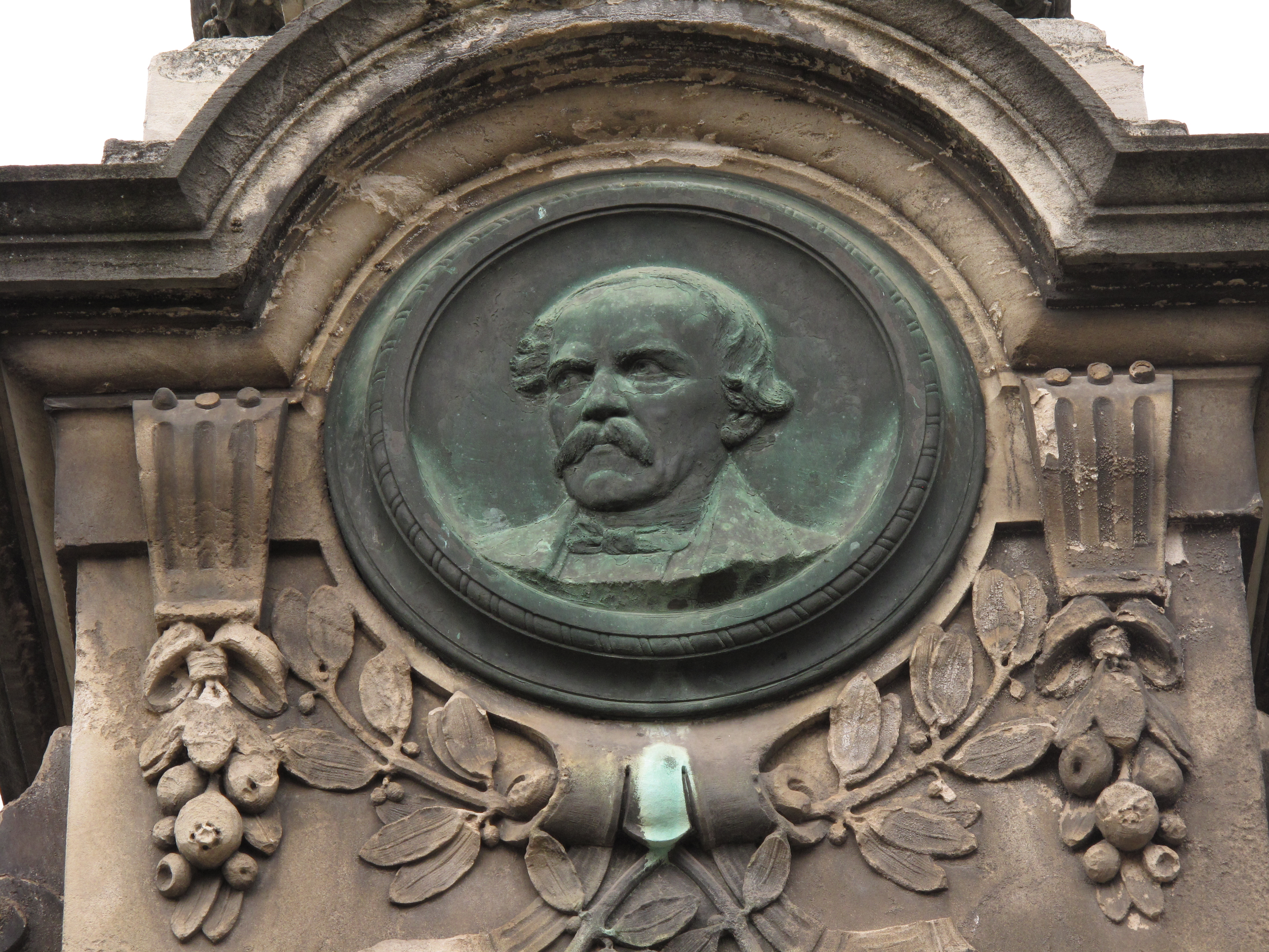 Reliéf v Kyselce (Bílina). Okres Teplice, Česká republika.